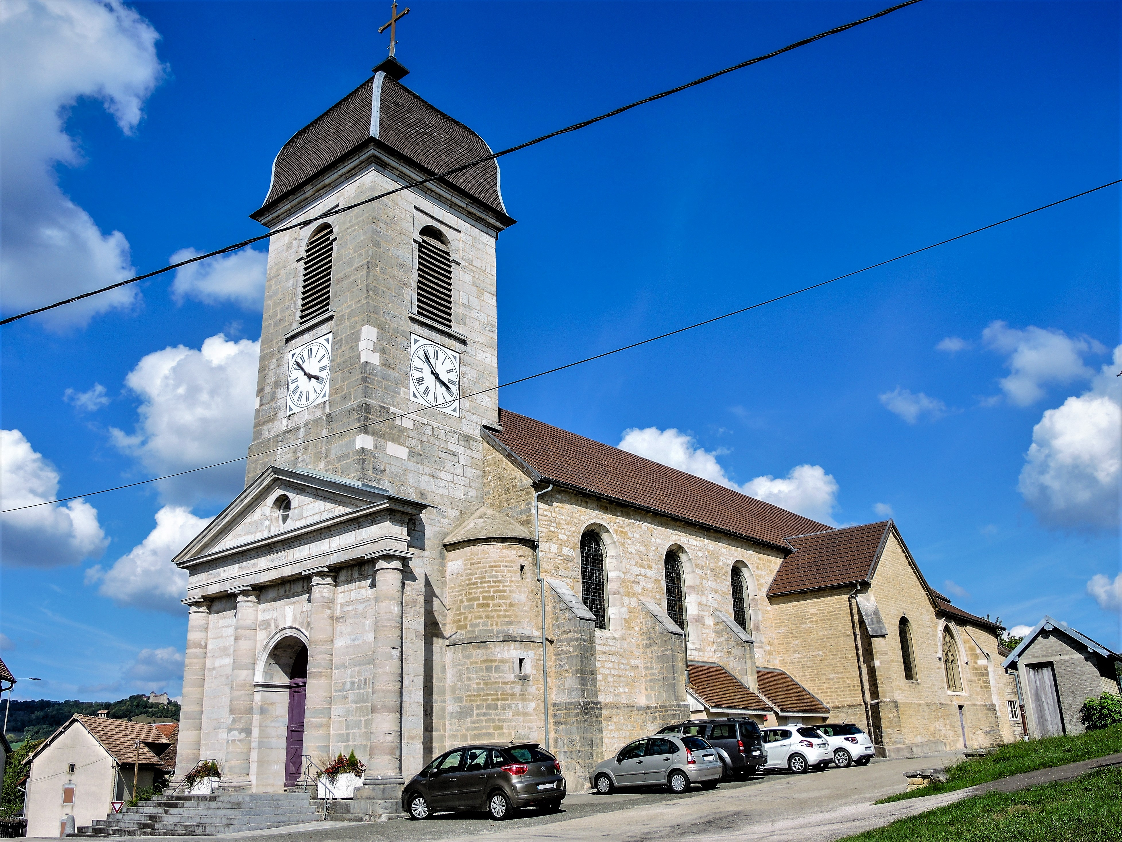 Eglise Saint-Martin. Sancey-l'Eglise. Doubs